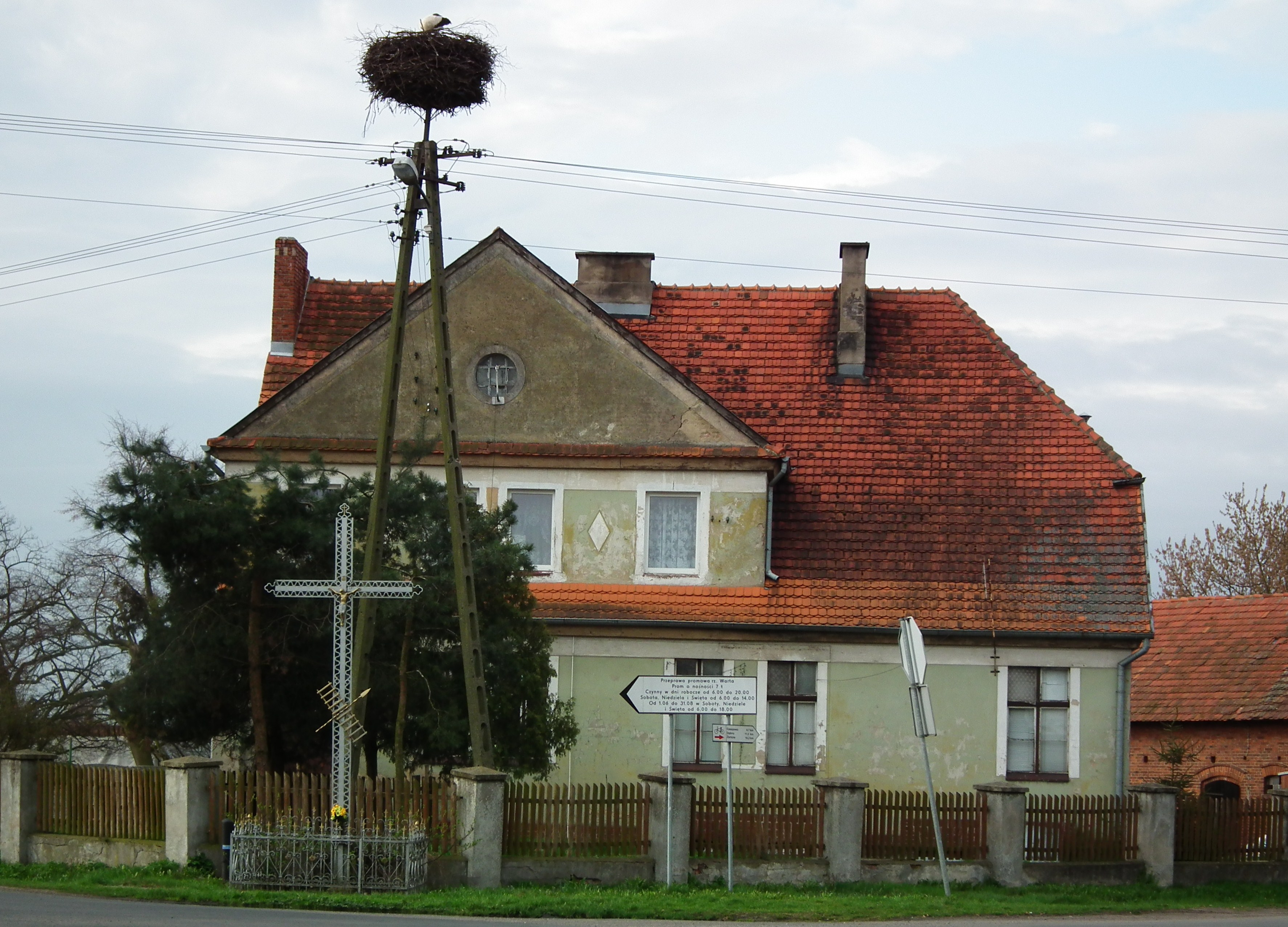 Mikuszewo.